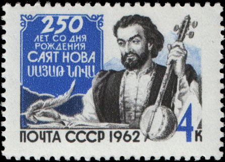 Портрет Саят-Нова с народным музыкальным инструментом - кеманчой (по мотивам картины Г. Рухкяна). Почтовая марка СССР 1962г.